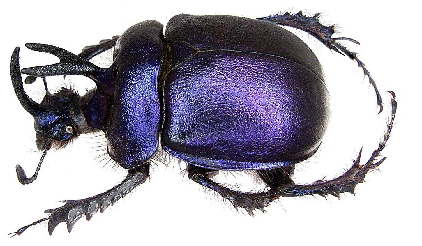 Familie: Geotrupidae Groesse: 32 mm Fundort: Thailand, Chiang Noi, 1986 det. U.Schmidt Photo: U.Schmidt, 2006